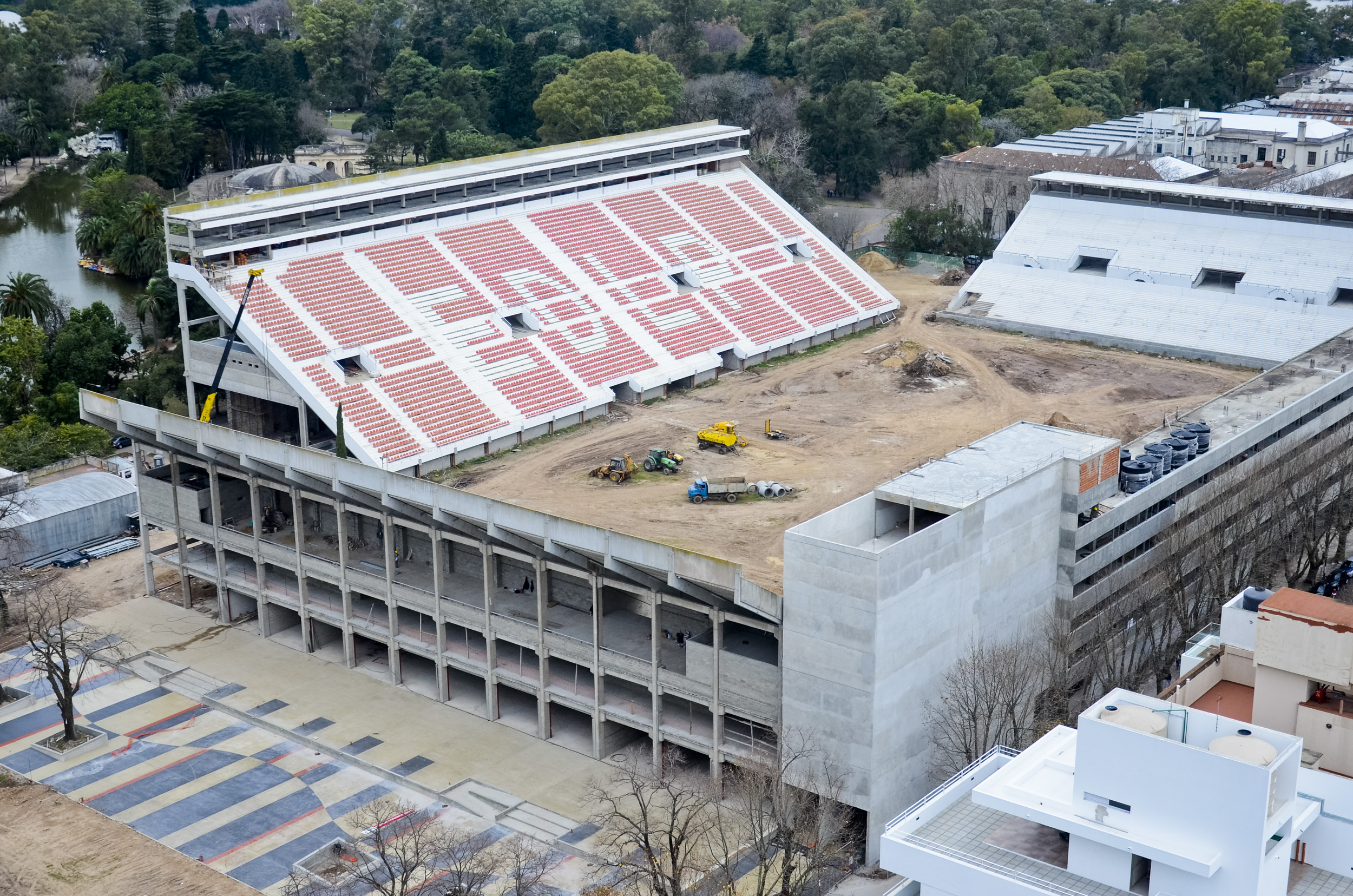 Aquí se ve desde las alturas la construcción del nuevo Estadio Jorge Luis Hirschi, de Estudiantes de La Plata.